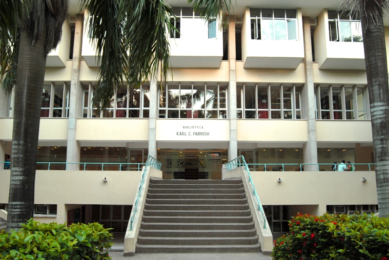 Fachada Edificio Biblioteca Carl Parrish ubicada en las instalaciones de la Universidad del Norte en Barraquilla Colombia.